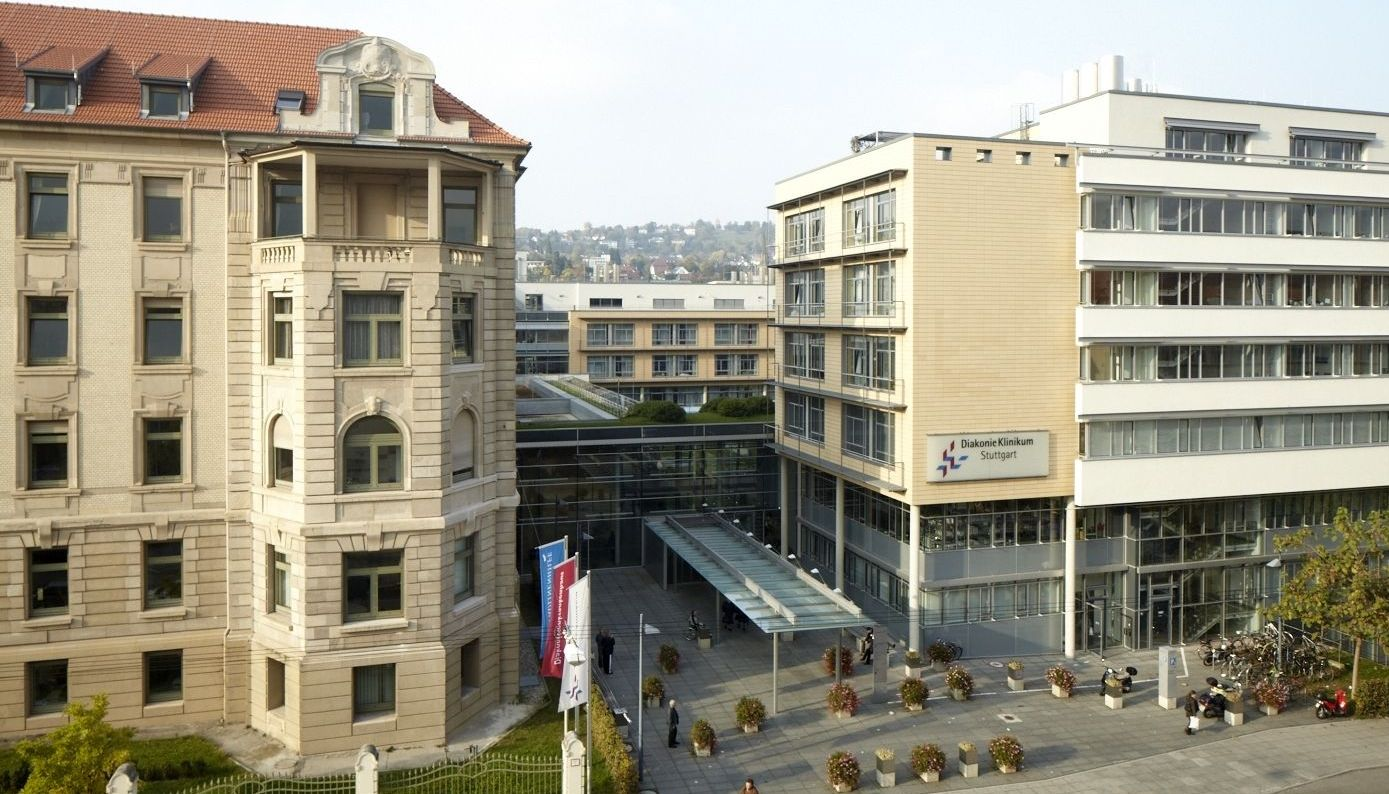 Luftaufnahme des Diakonie-Klinikums Stuttgart